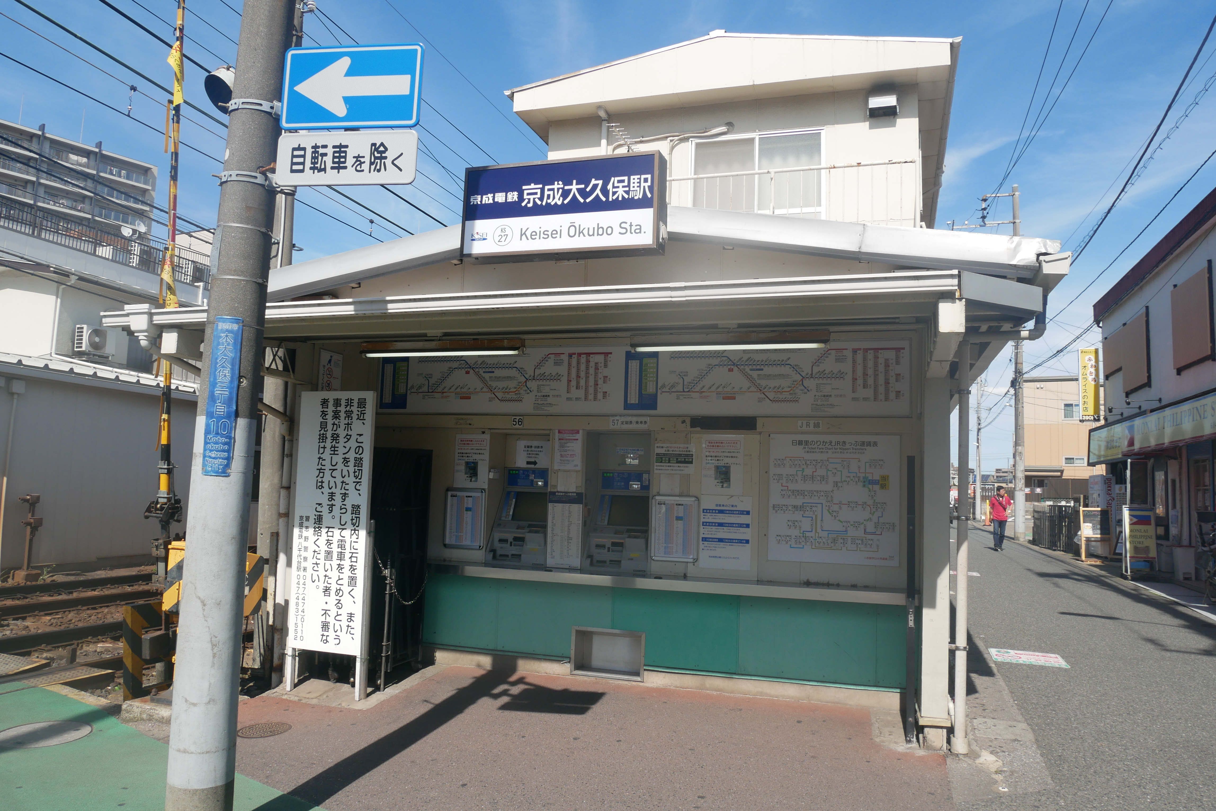 京成大久保駅 (Keisei-Ōkubo Station)